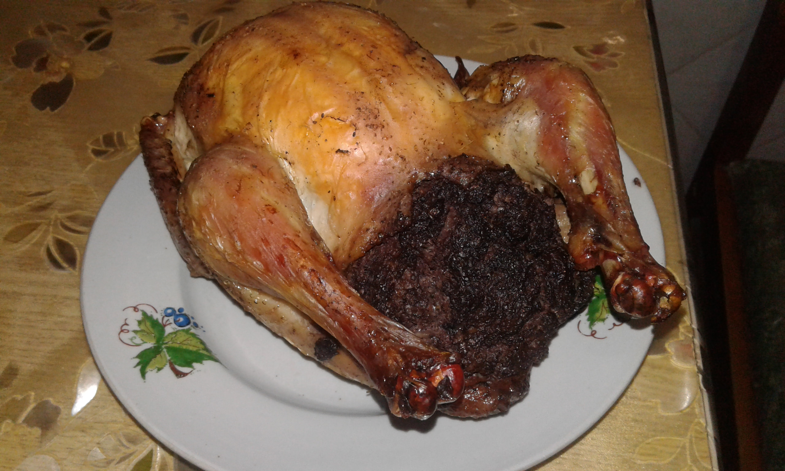 Лявянги из цыпленка.